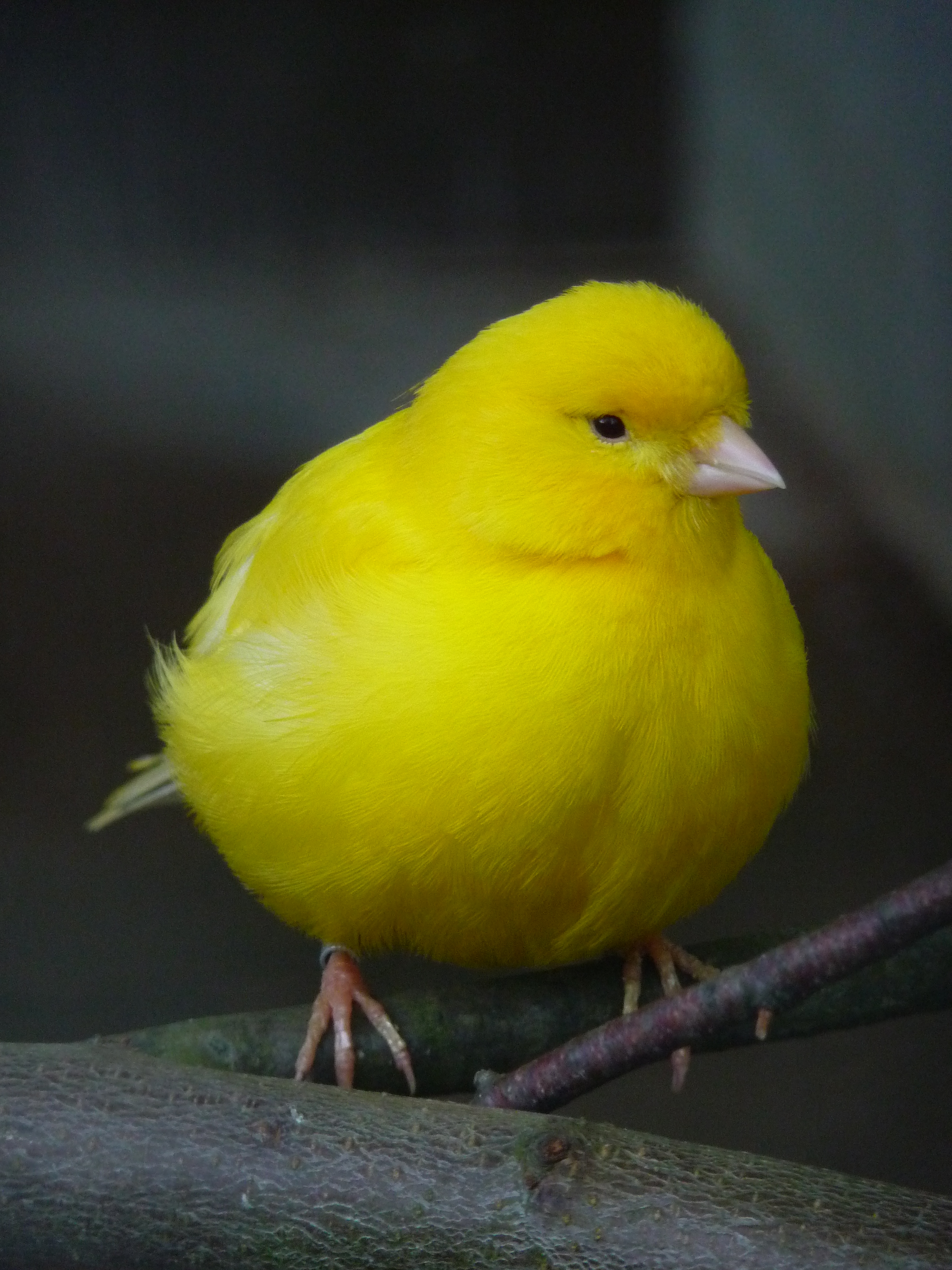 Gelber Kanarienvogel (Serinus canaria domestica)